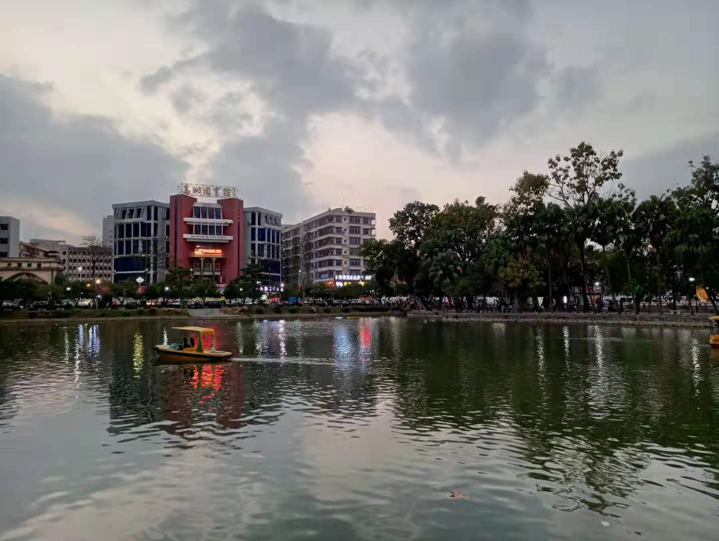 中文（中国大陆）: 潘州公园